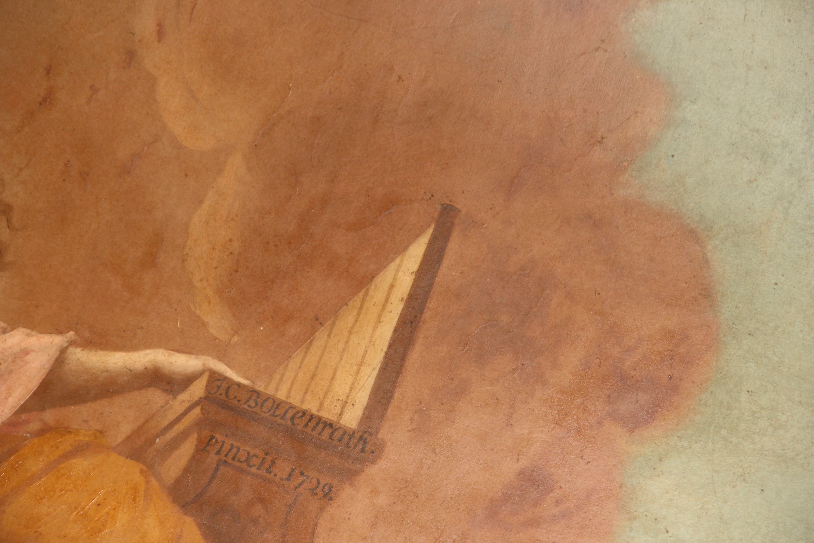 Deckengemälde der Schlosskapelle in Nörvenich